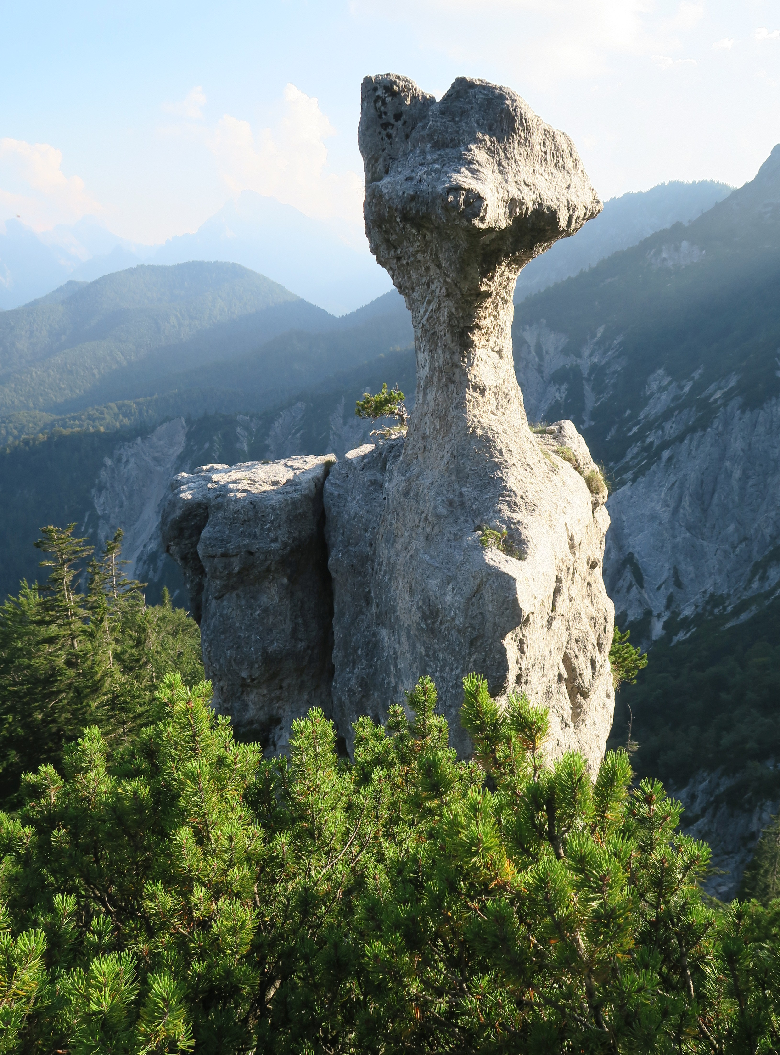 Steinerne Agnes, Bergseite. Im Hintergrund links der Hochkalter